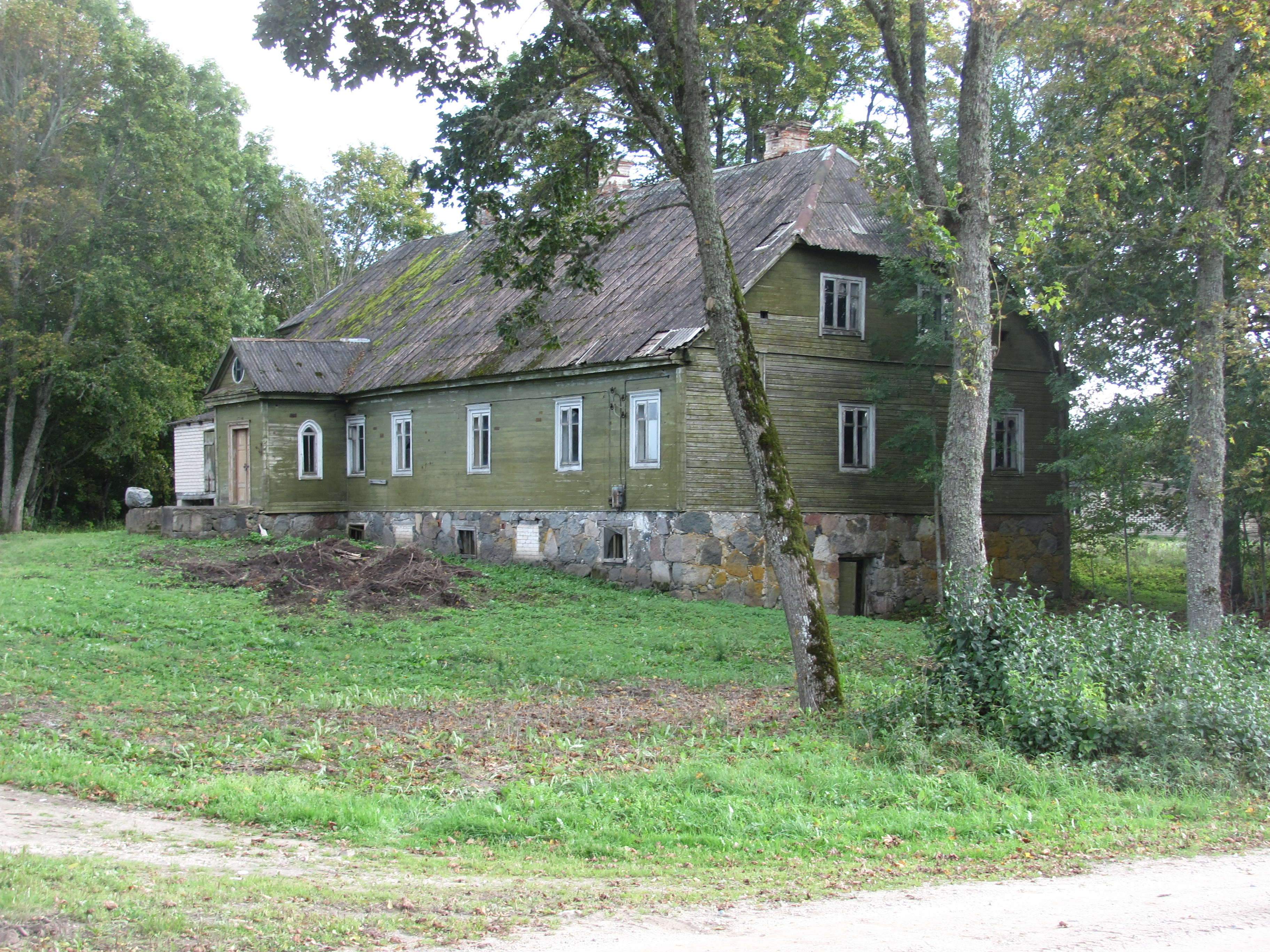 Bagdoniškis 42270, Lithuania